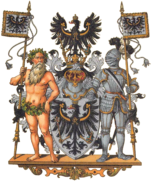 Provinz Ostpreußen.